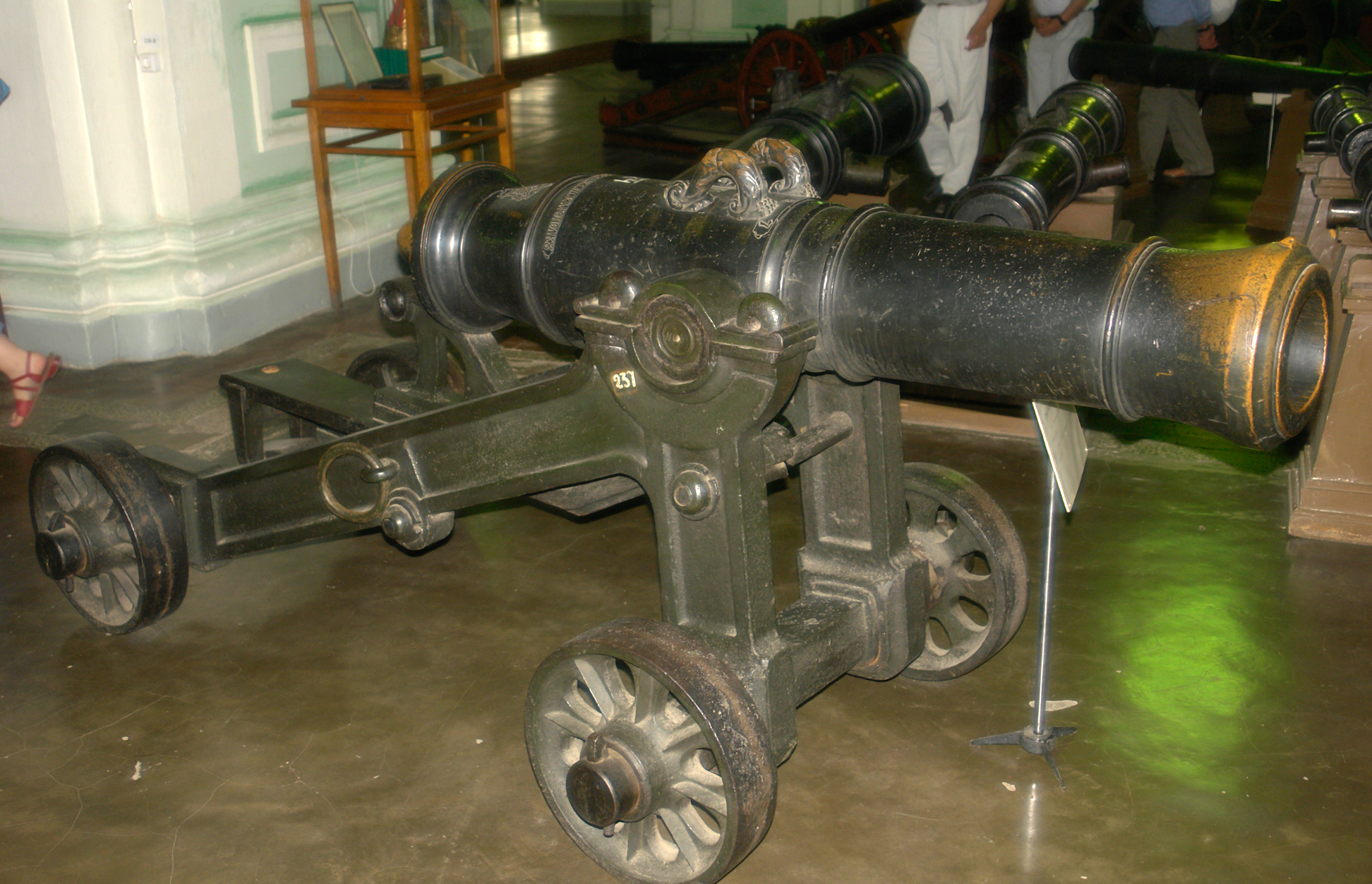 Ствол 1.2 пудового (166-мм) полкового единорога. Ствол бронзовый. Длина 161 см. Масса 692 кг. Отлит в 1787 году.